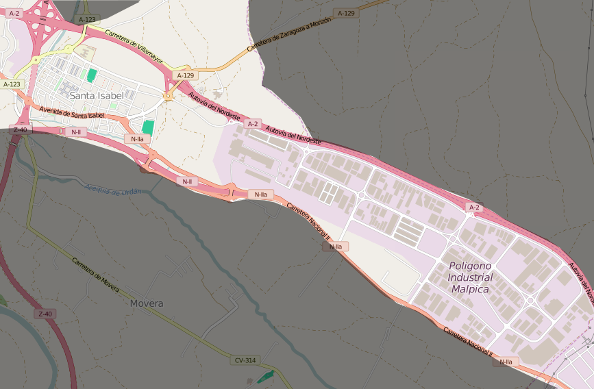 Mapa del distrito de Santa Isabel en Zaragoza.